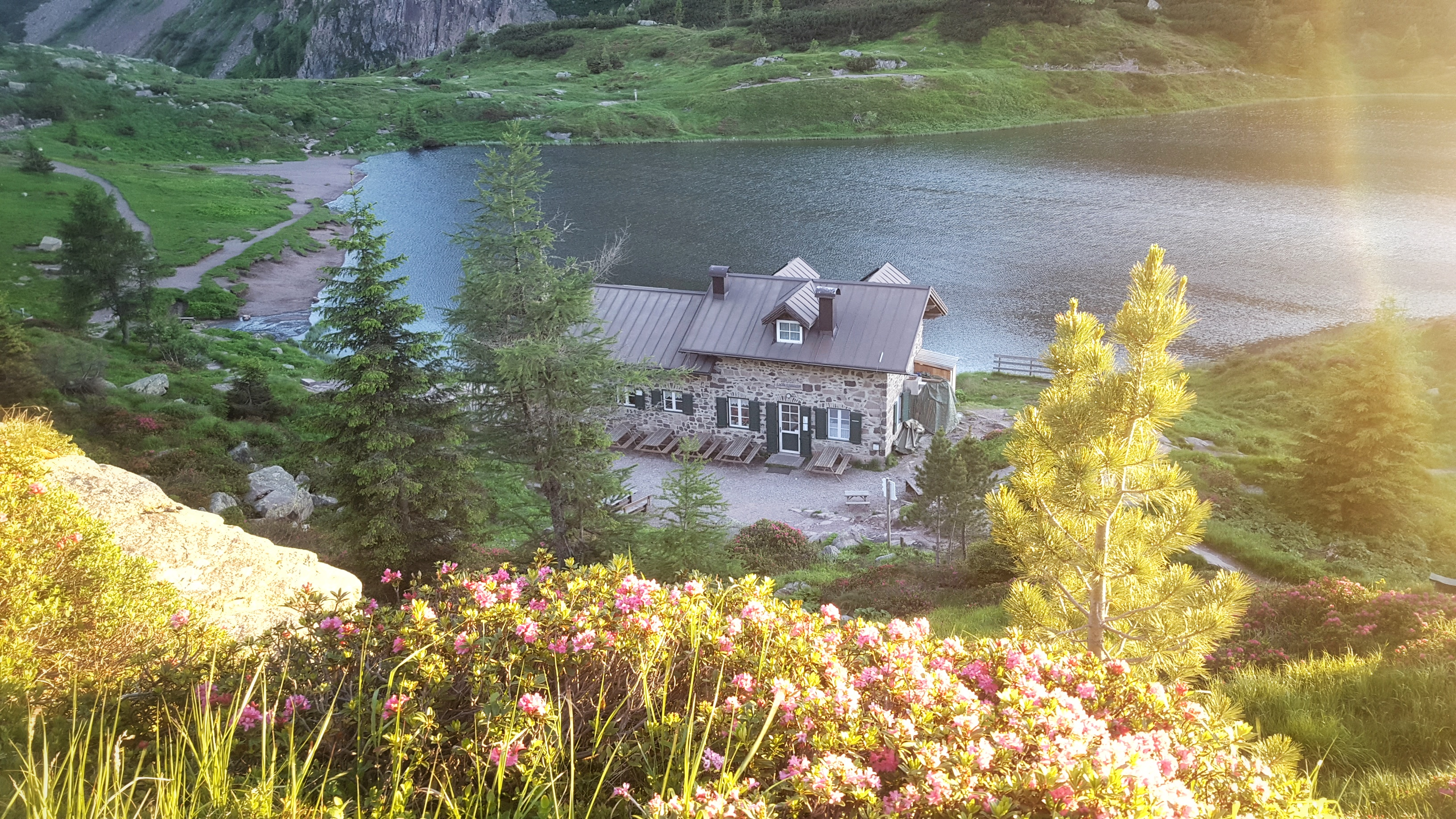 Il Rifugio ai laghi di Colbricon